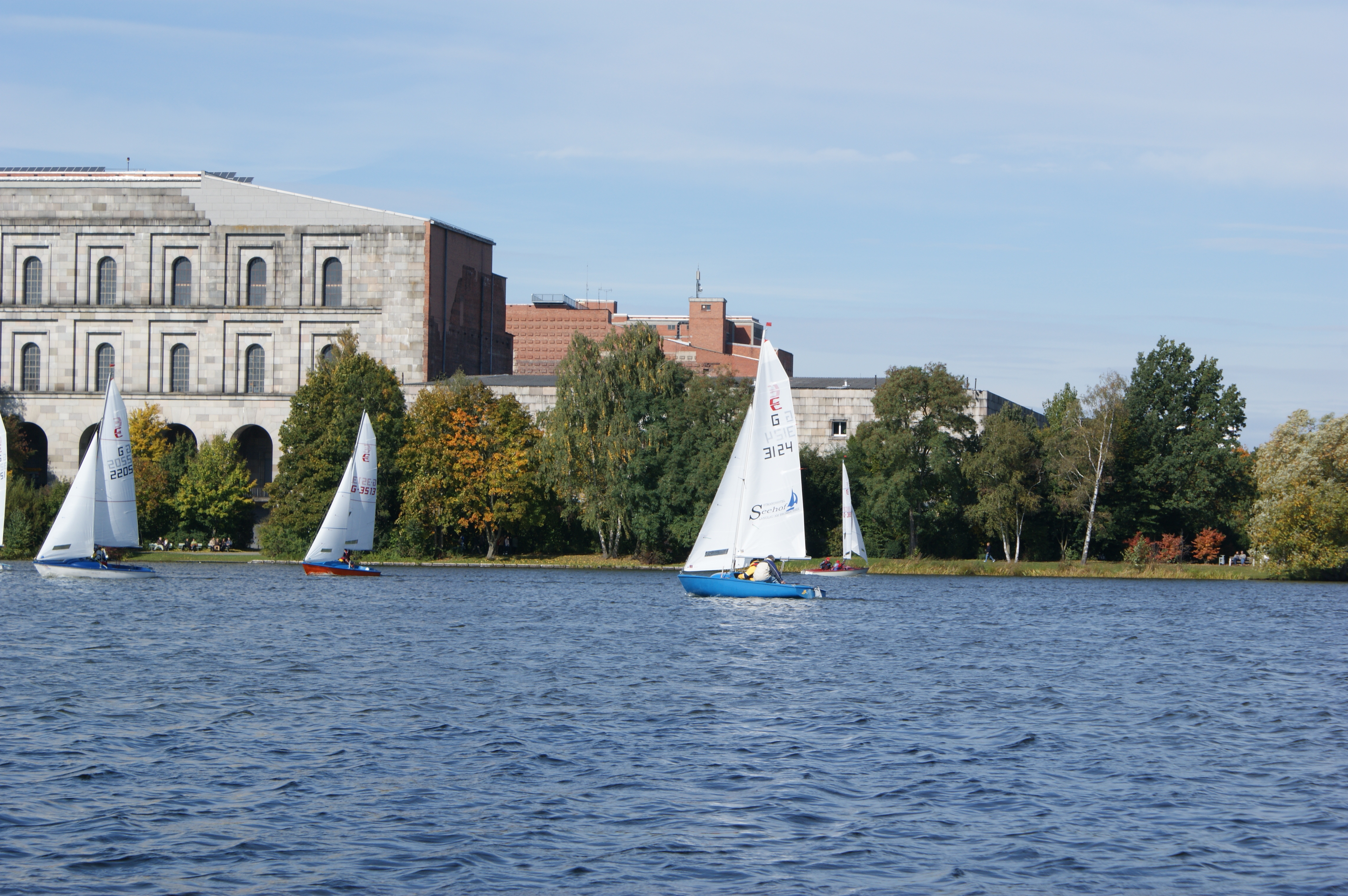 Dutzendteich 10/2008